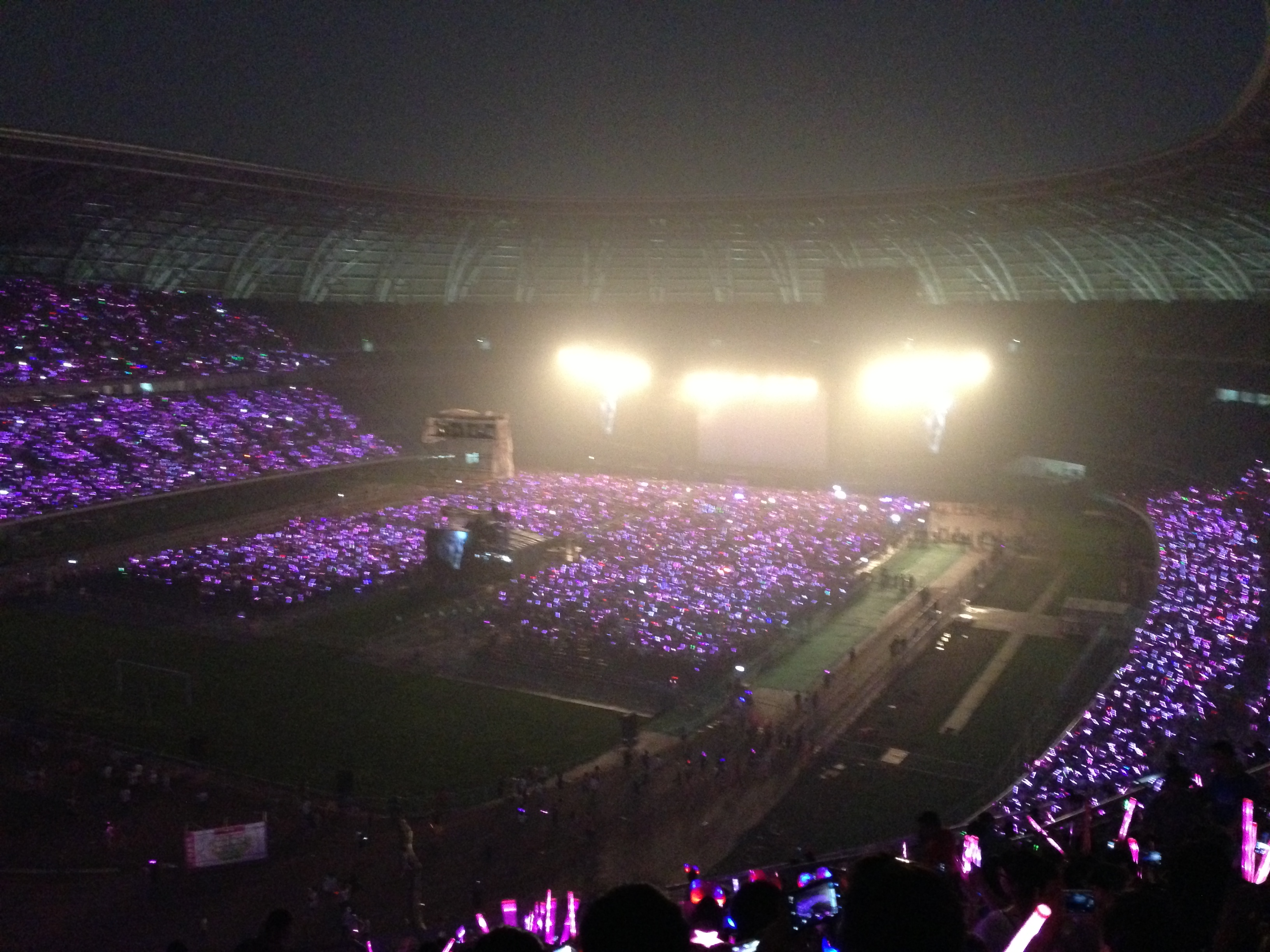 2013摩天轮周杰伦天津演唱会